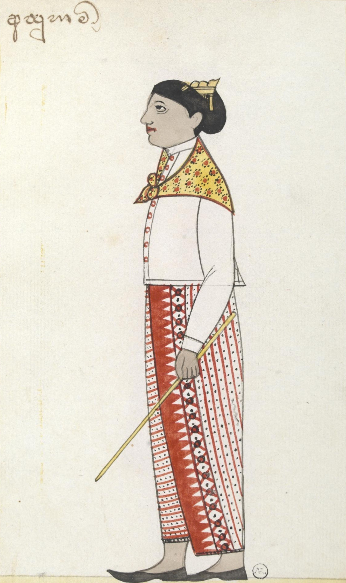 Painting of an Appuhamy